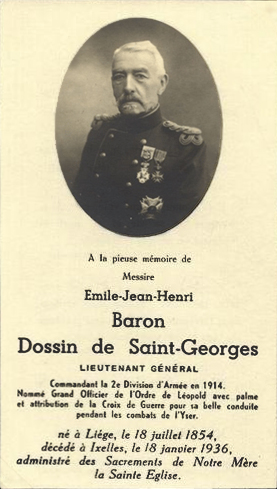 Feuillet souvenir, décès du Général Dossin, 1854-1936